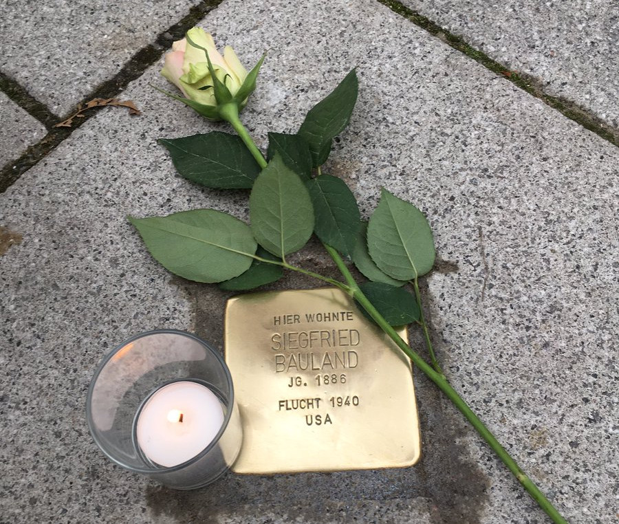 Stolperstein Neu-Ulm Siegfried Bauland